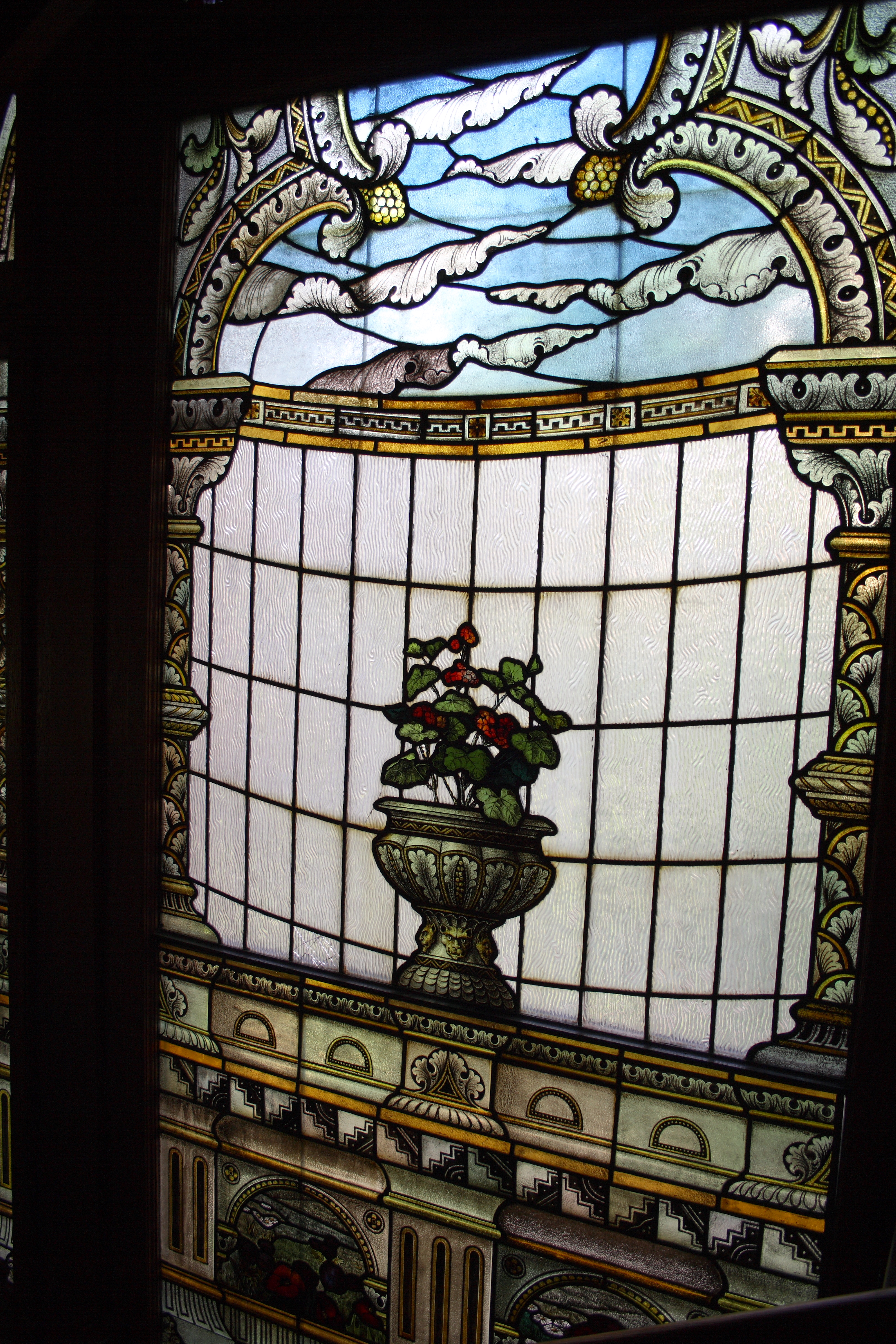 farbig verglastes Treppenhausfenster in der Villa Hubertus in Braunfels (Lahn-Dill-Kreis, Hessen), Hubertusstraße 6